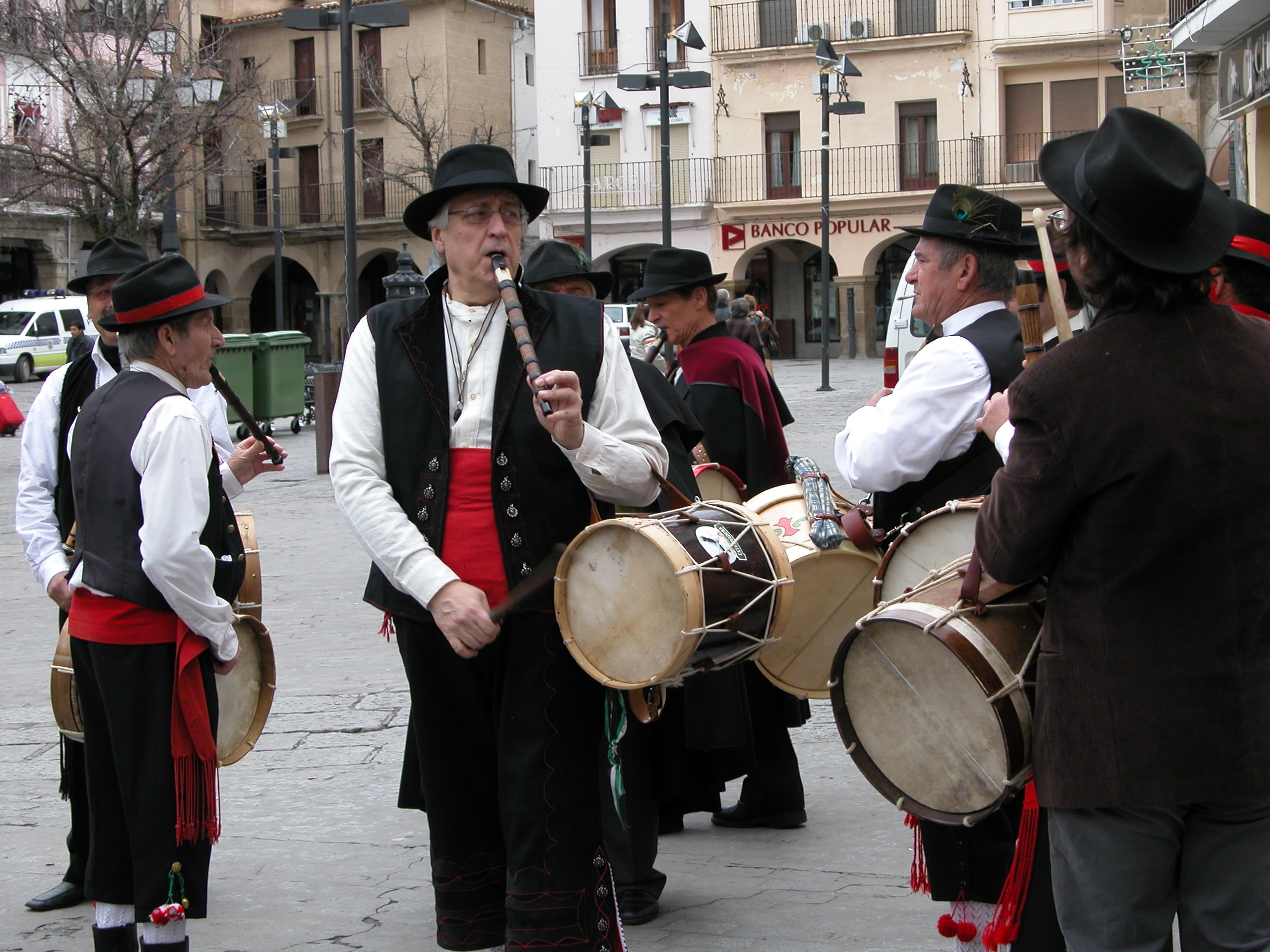 Tamborileros tocando el día de San Fulgencio en la Plaza Mayor de Plasencia, Cáceres (España)